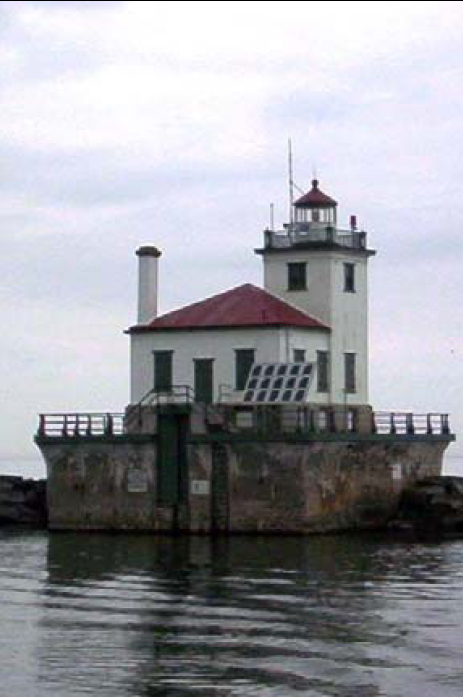 Oswego Harbor West Pierhead Lighthouse